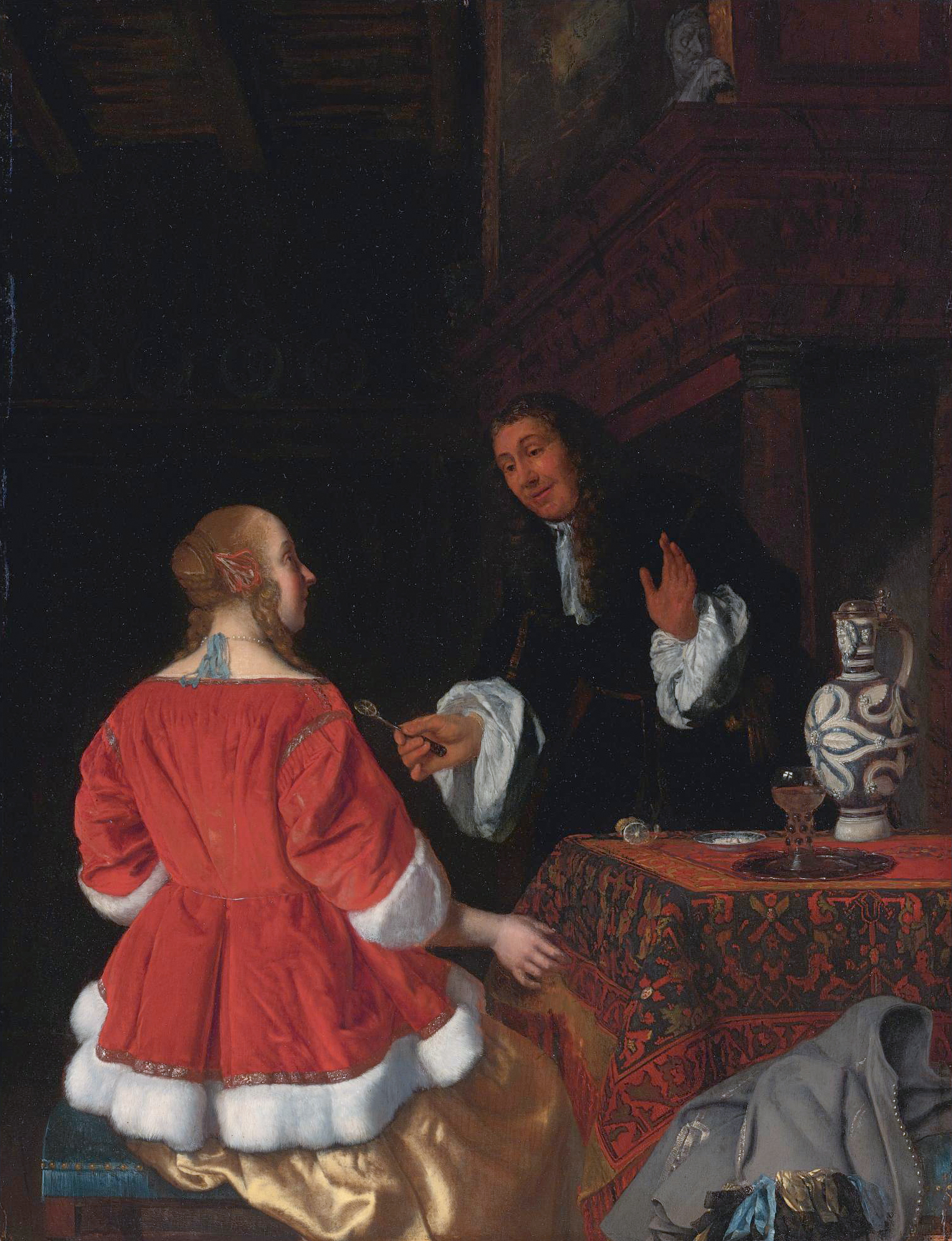 The lemon slice oil on panel 48.6 x 37.2 cm